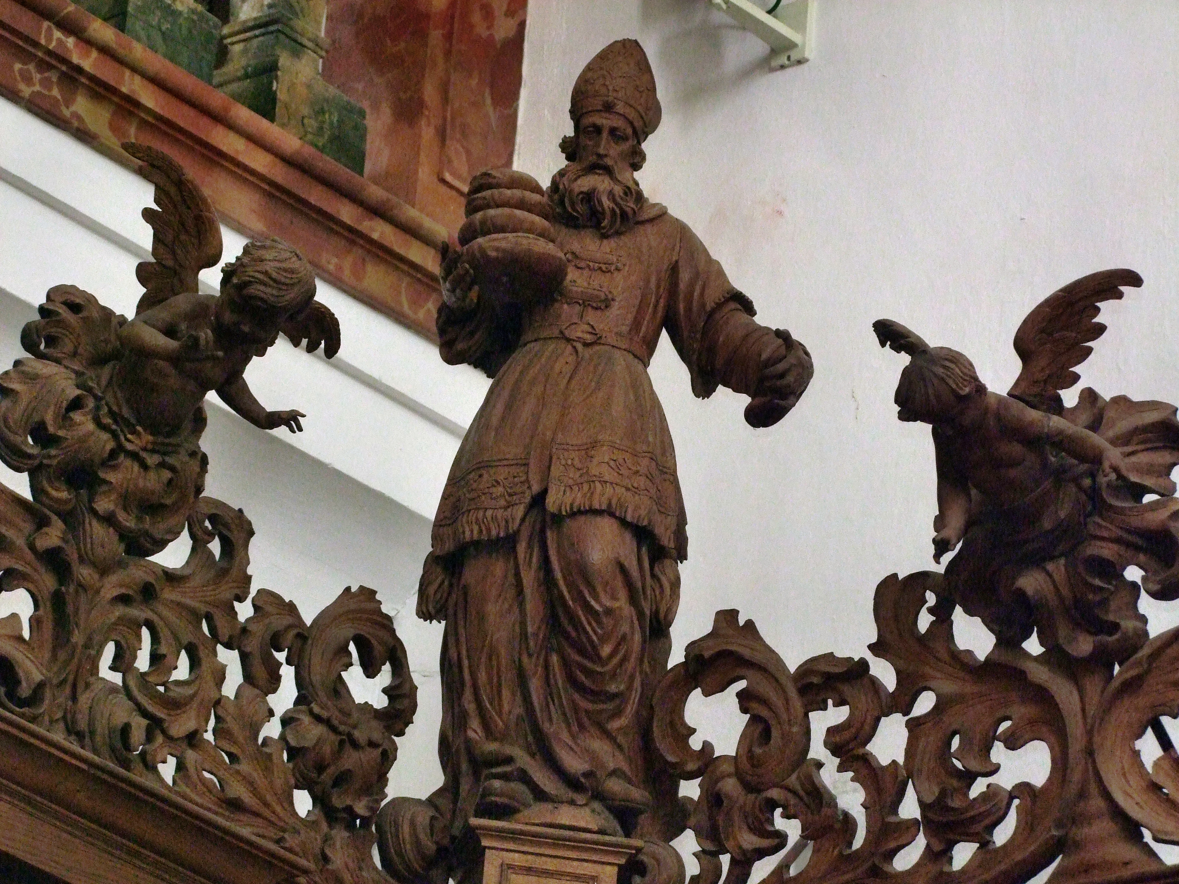 Chorgestühl in der ehemaligen Klosterkirche der Kartause in Buxheim bei Memmingen